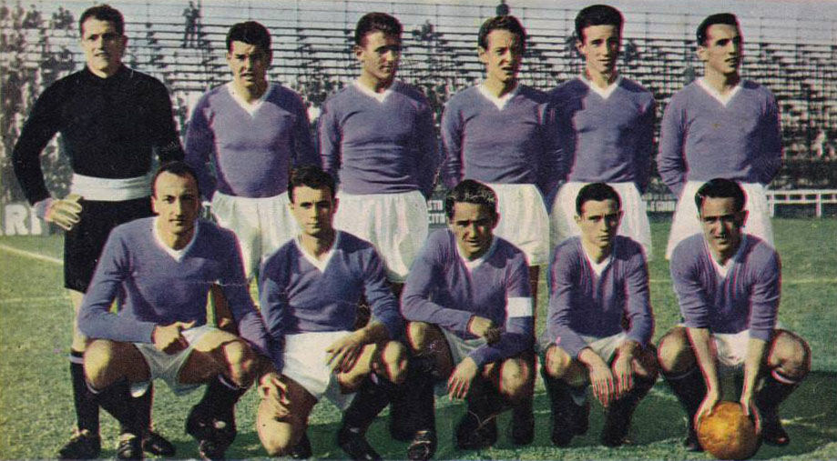 A line-up of A.C. Legnano in the 1956–57 season. From left to right, standing: F. Soldaini, L. Parodi, E. Tarabbia, K.-E. Palmér, E. Castano, L. Sassi (II); crouched: E. Colombi, A. Panara, L. Lupi (captain), Rivolta, E. Caprile.